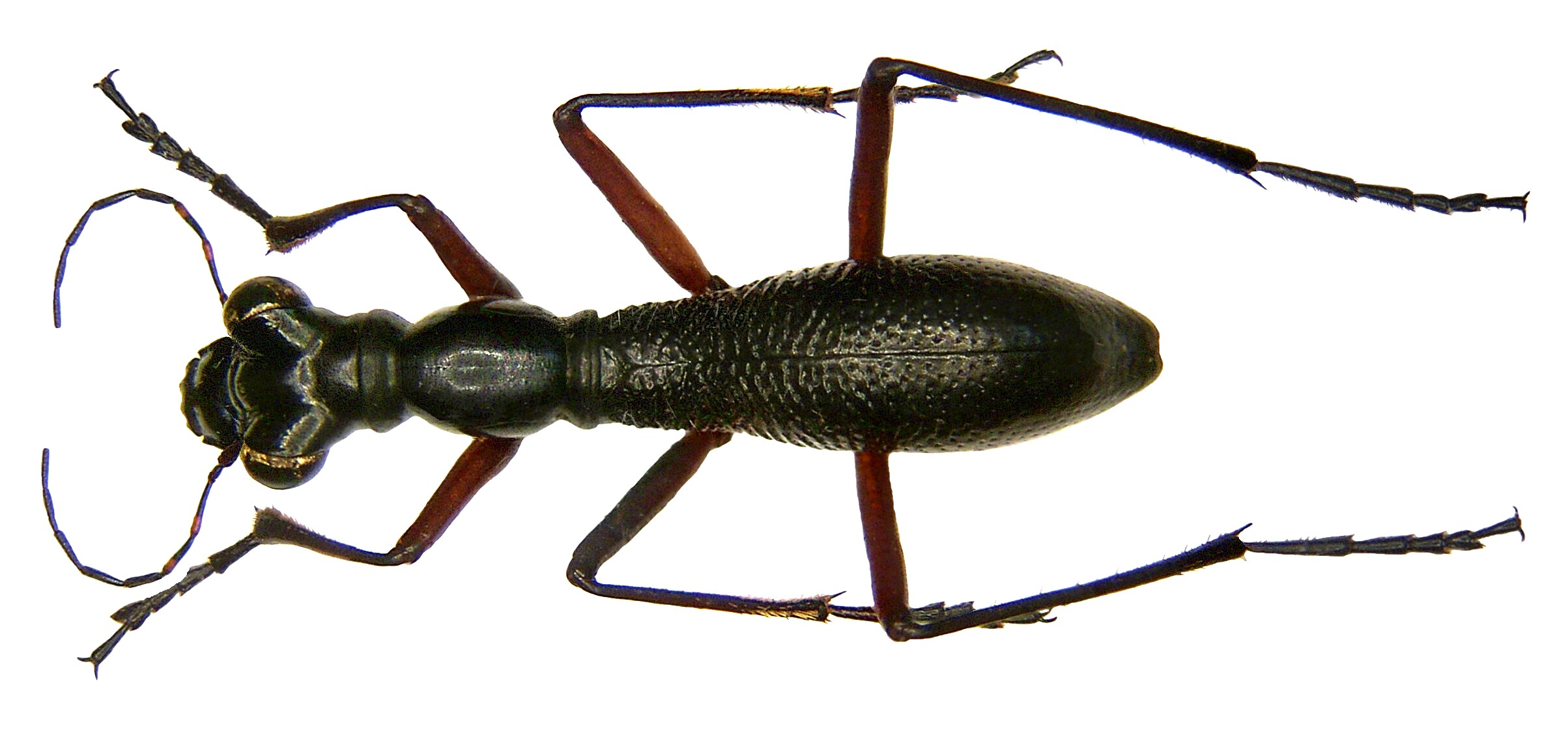 Familie: Carabidae Grösse: 22 mm Fundort: Indonesien, Halmahera, Dolik leg. A.Skale, 2006; det. J.Wiesner Foto: U.Schmidt, 2007